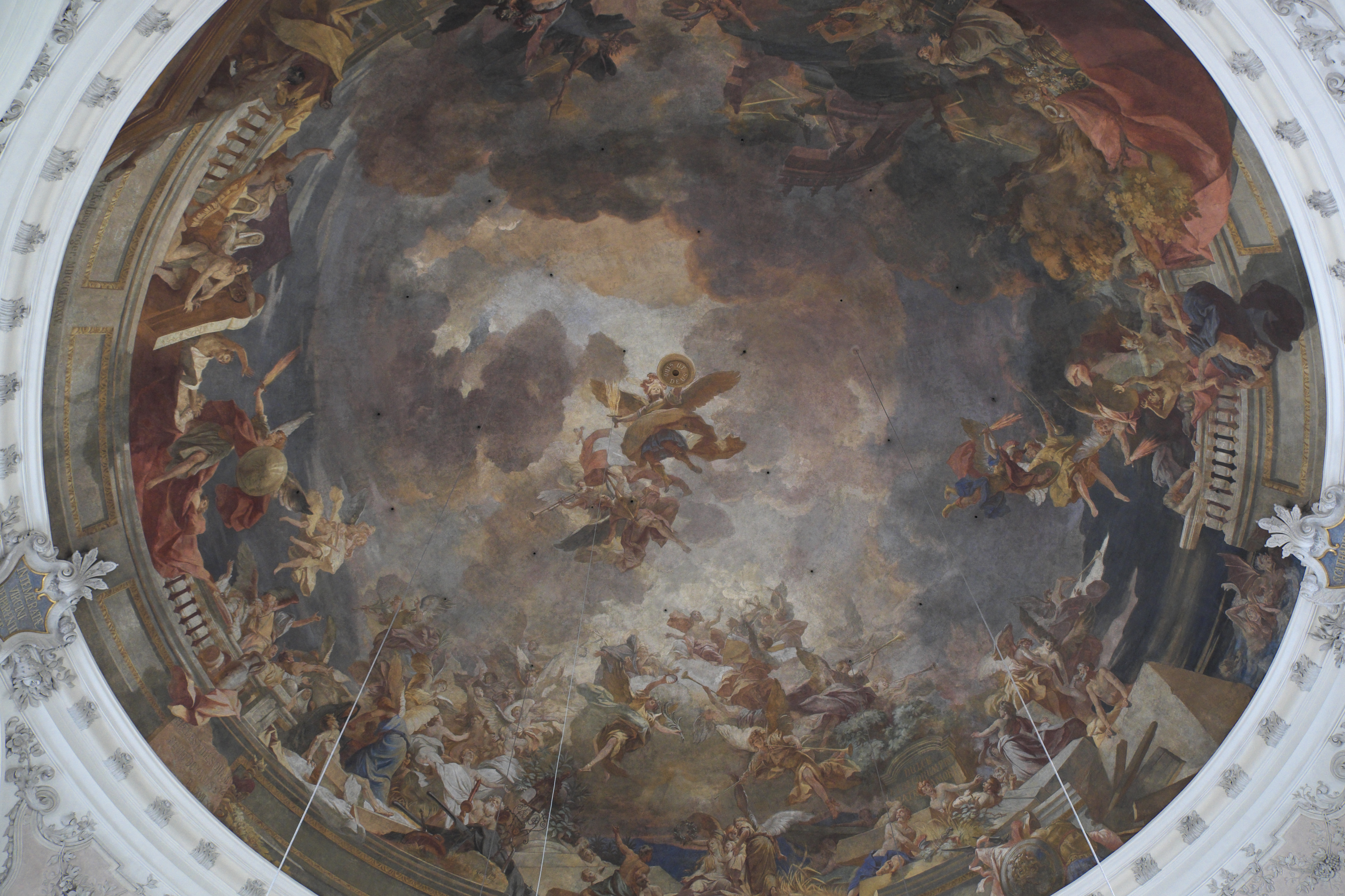 Katholische Pfarrkirche St. Nikolaus in Murnau am Staffelsee im Landkreis Garmisch-Partenkirchen (Bayern/Deutschland), Deckenmalerei von Waldemar Kolmsperger dem Älteren, von 1893/95; Darstellung: Jüngstes Gericht